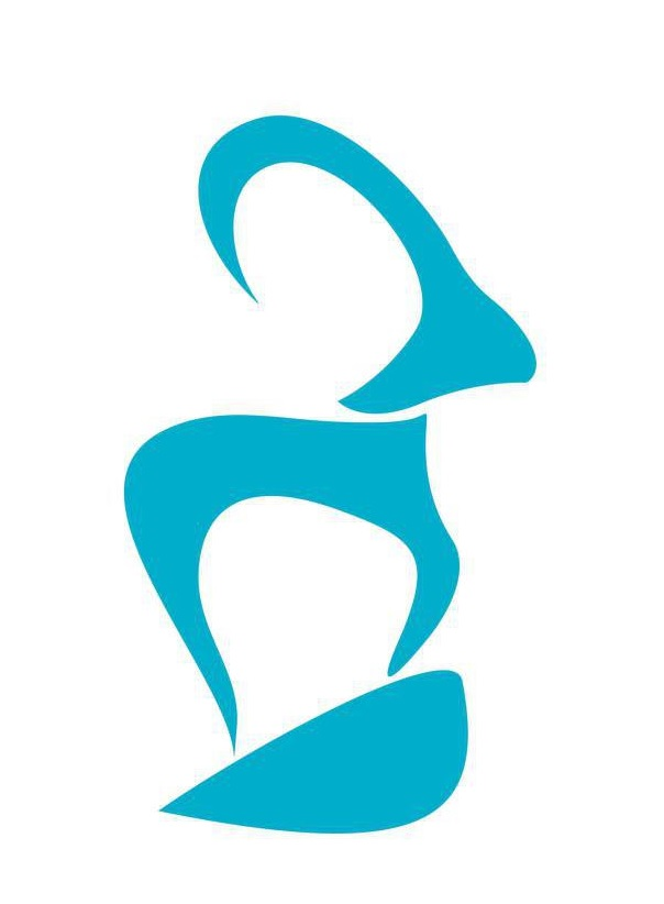 نماد حزب اراده ملت ایران